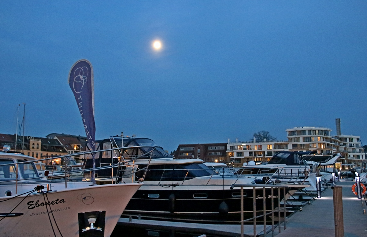 Motoryachten im abendlichen Stadthafen von Waren